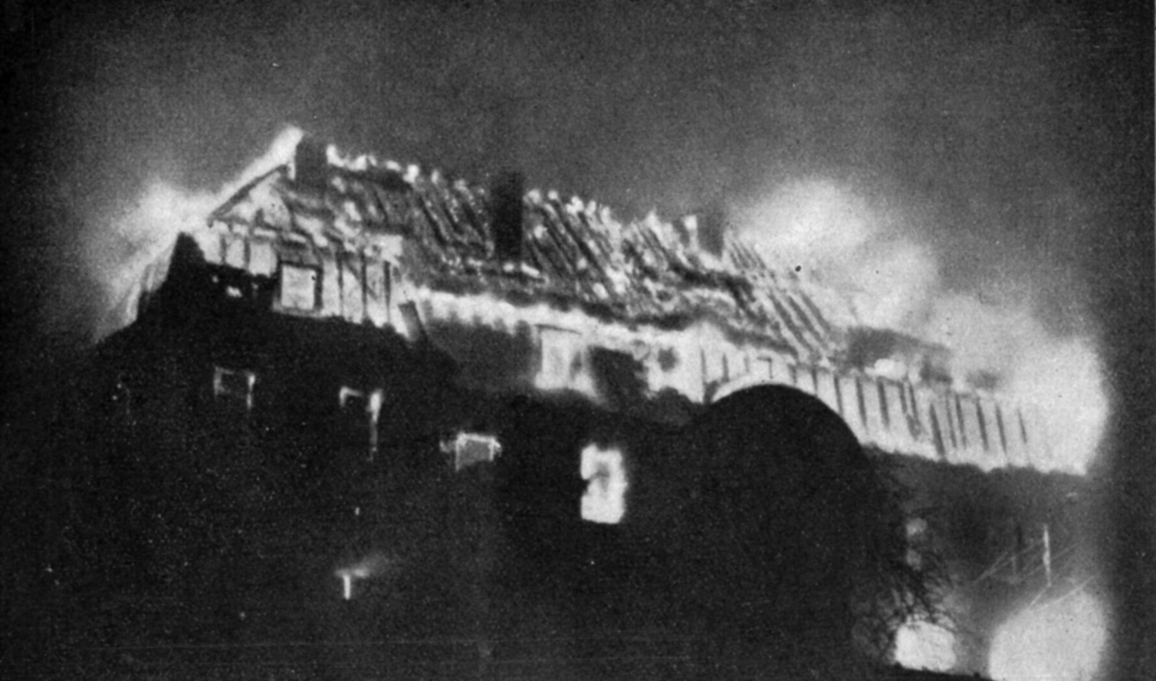 Brennendes Bezirksamt Pirmasens, Separatistenkämpfe Pfalz 1924